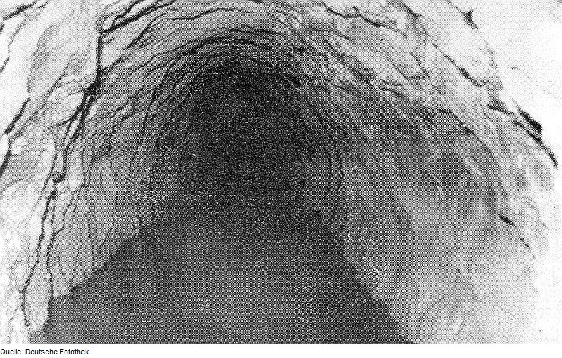 Original image description from the Deutsche Fotothek Triebischtal-Rothschönberg. Blick in den Rothschönberger Stollen, aus: Sächs. Heimatblätter 6, 1978